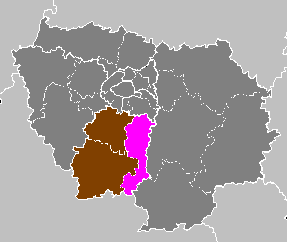 Maps of arrondissements and cantons of France: Département de l Essonne - Arrondissement d Évry.PNG (Région Île-de-France)